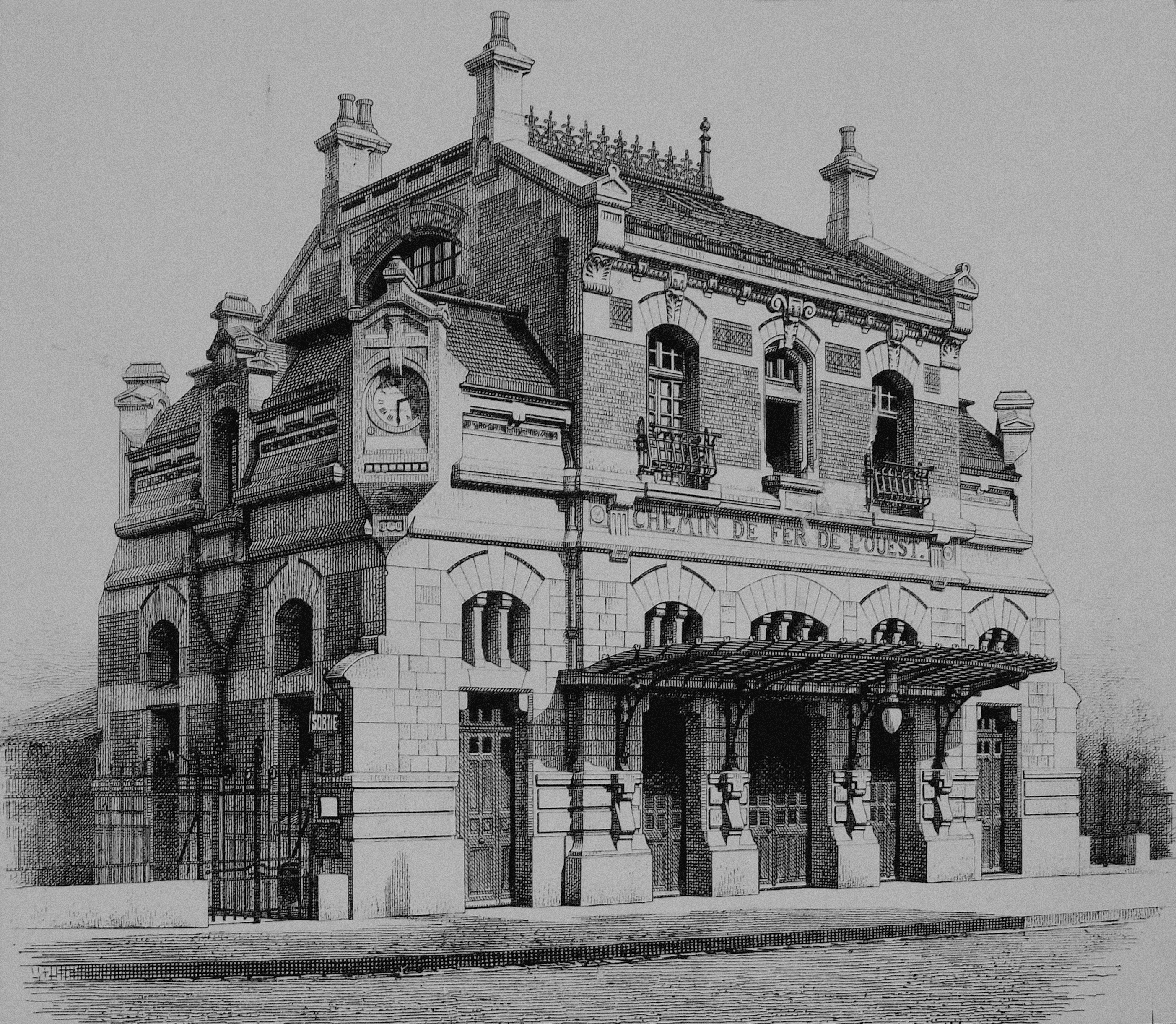 Dessin d'architecte pour la construction de la gare de Boulainvilliers, à Paris (16e), non signé. Vers 1900.